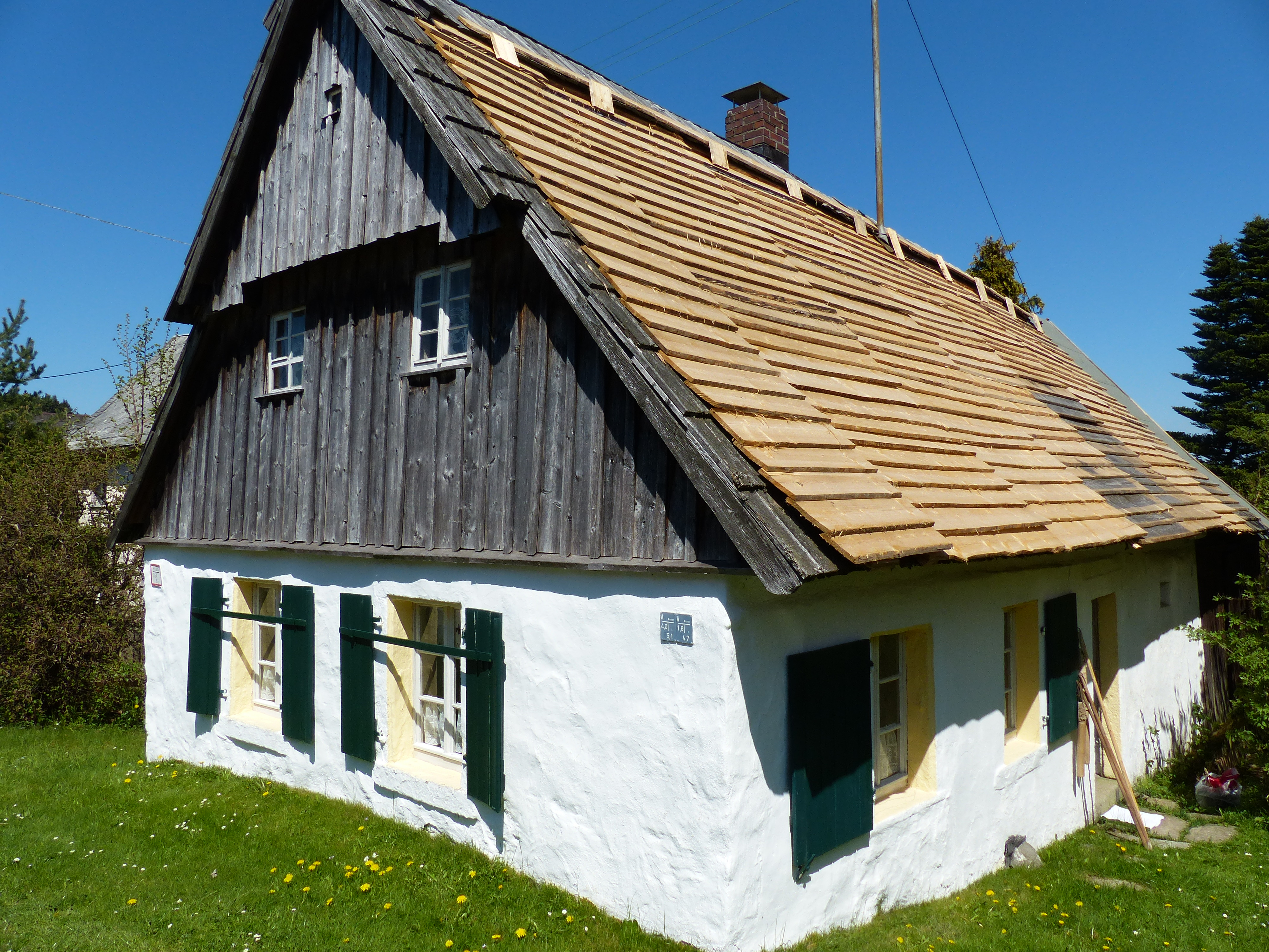 Bilderserien Ortsansichten von Kleinschwarzenbach, darunter Baudenkmäler und Weberhäuser